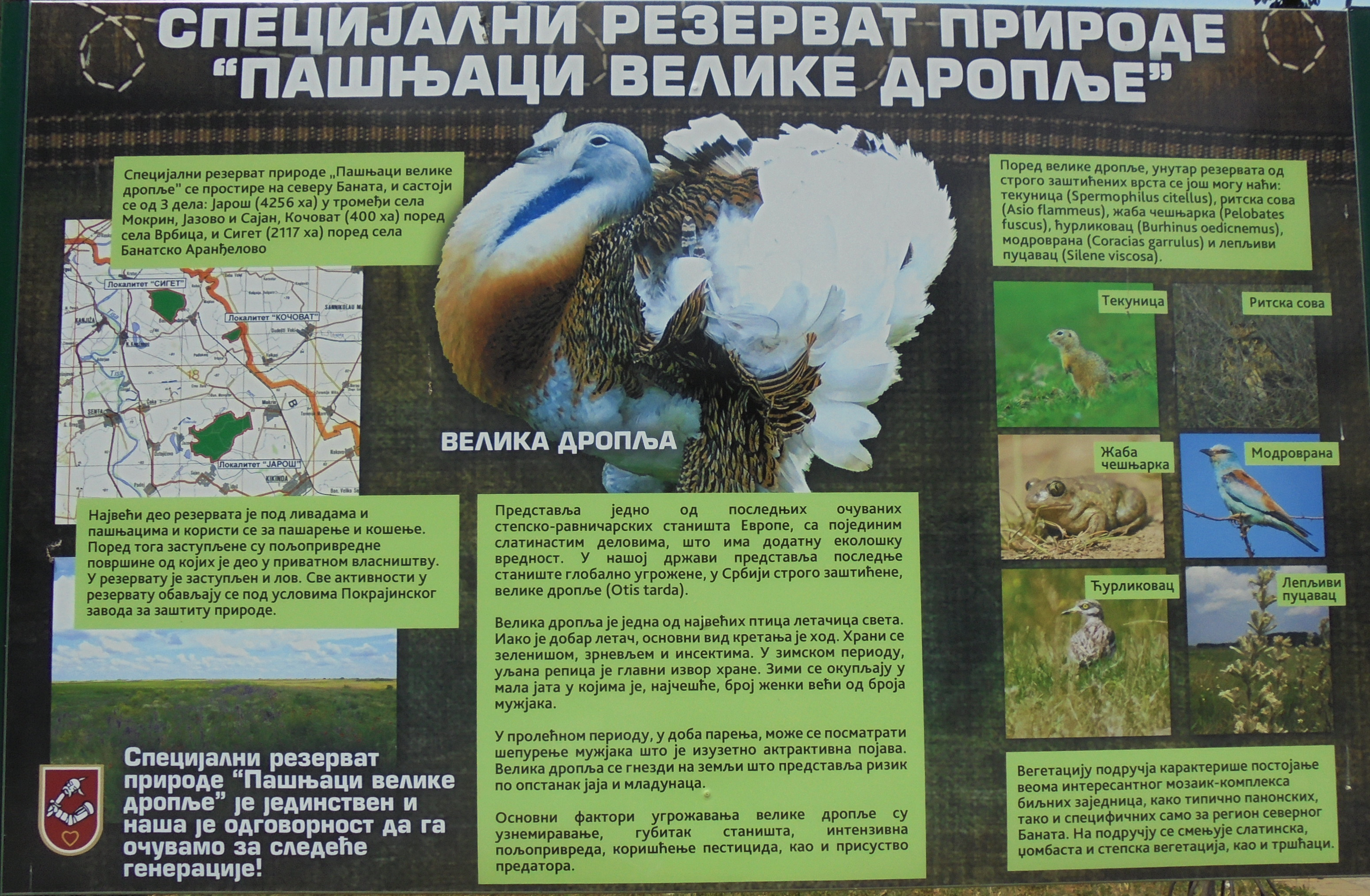 Srpski (latinica): Table sa informacijama o Specijalnom rezervatu za zaštitu velike droplje, postavljene su u krugu samog rezervata, u centru Kikinde i drugim mestima koja se nalaze u blizini ovog rezervata Ово је фотографија заштићеног природног добра у Србији под шифром: РП21 This is a a photo of a natural area in Serbia with ID: РП21